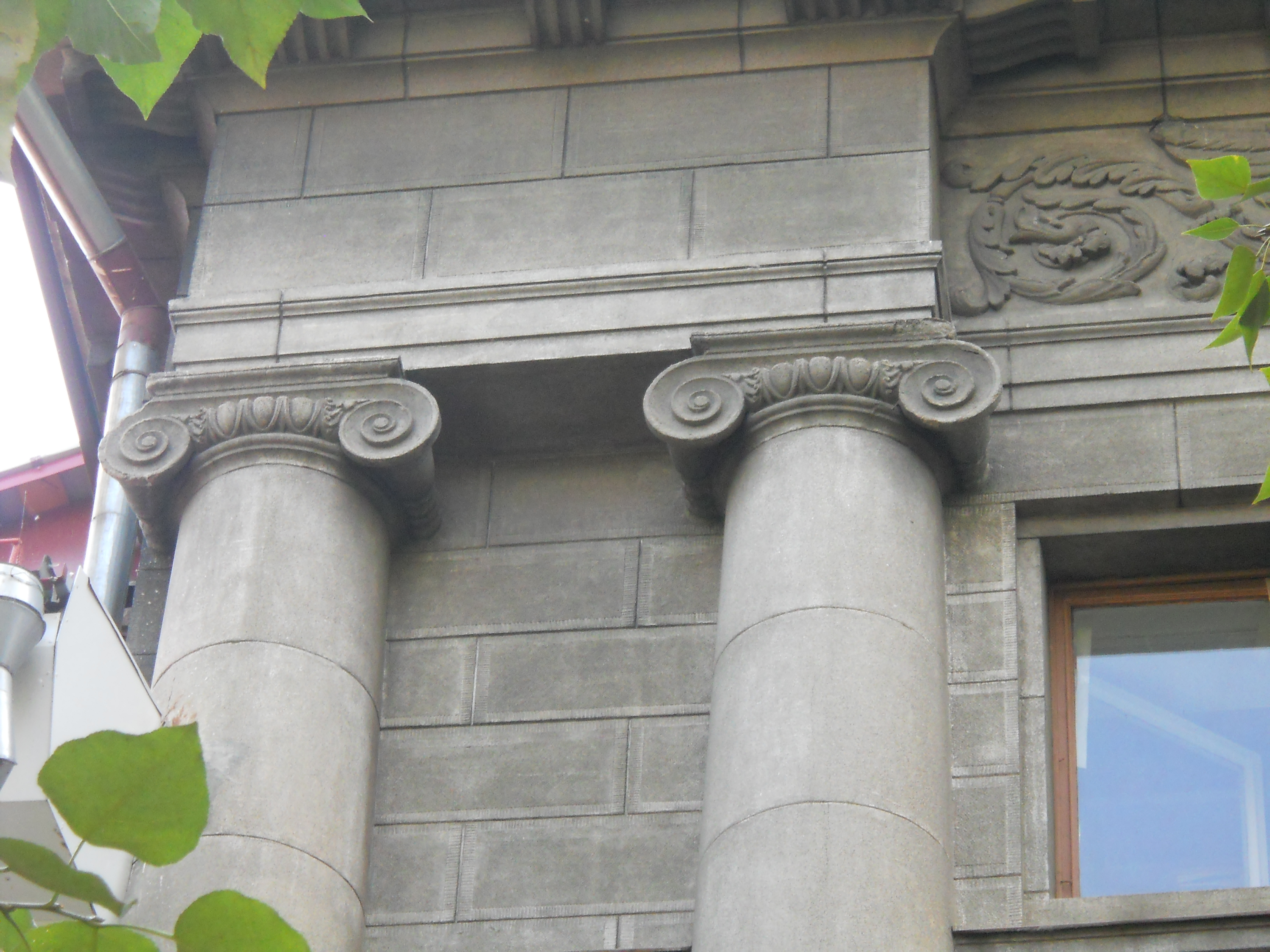 Дом по адресу пер. Кооперативный, 5. Ранее особняк И.И.Смирновой, сейчас здание НИИ онкологии СО РАМН. Деталь фасада.